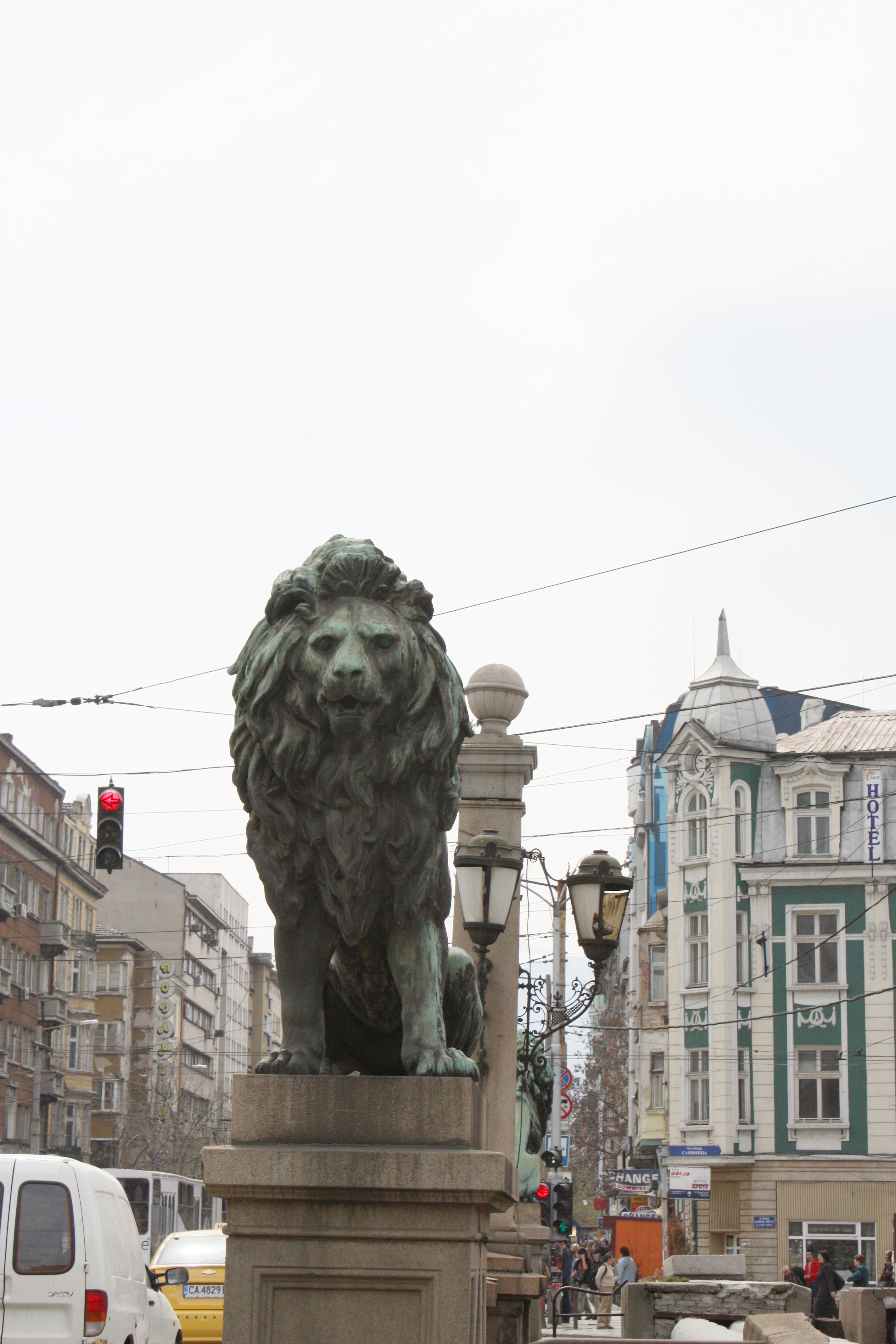 Luvvo most, Sofia, Лъвов мост, Bulgaria, Löwenbrücke